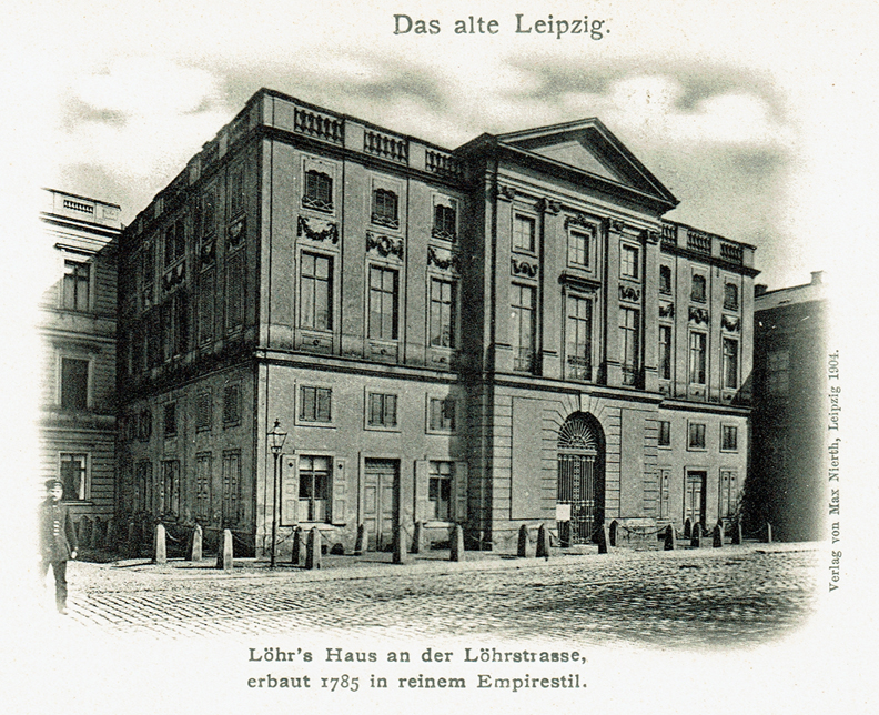 Ansicht von Löhrs Haus, vor 1904